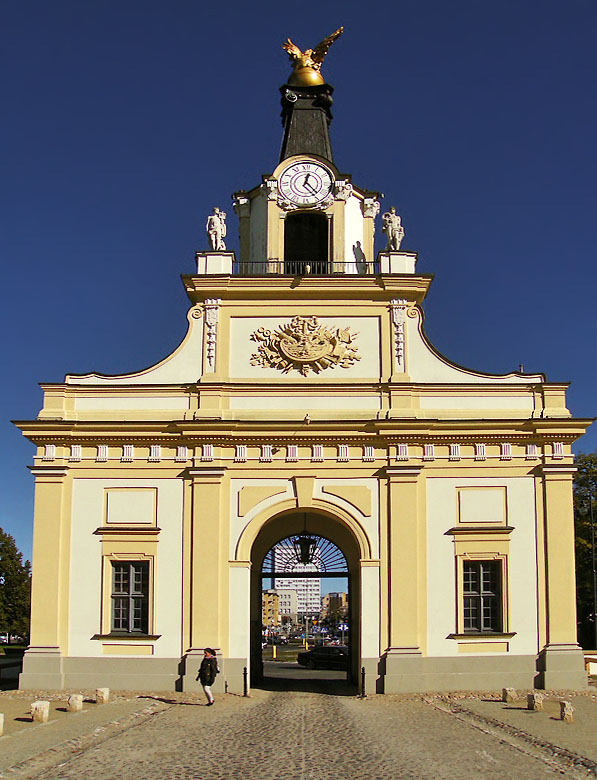 Białystok, brama główna (wieża Gryfa) Pałacu Branickich (zabytek nr A-271 z 2.12.1958)